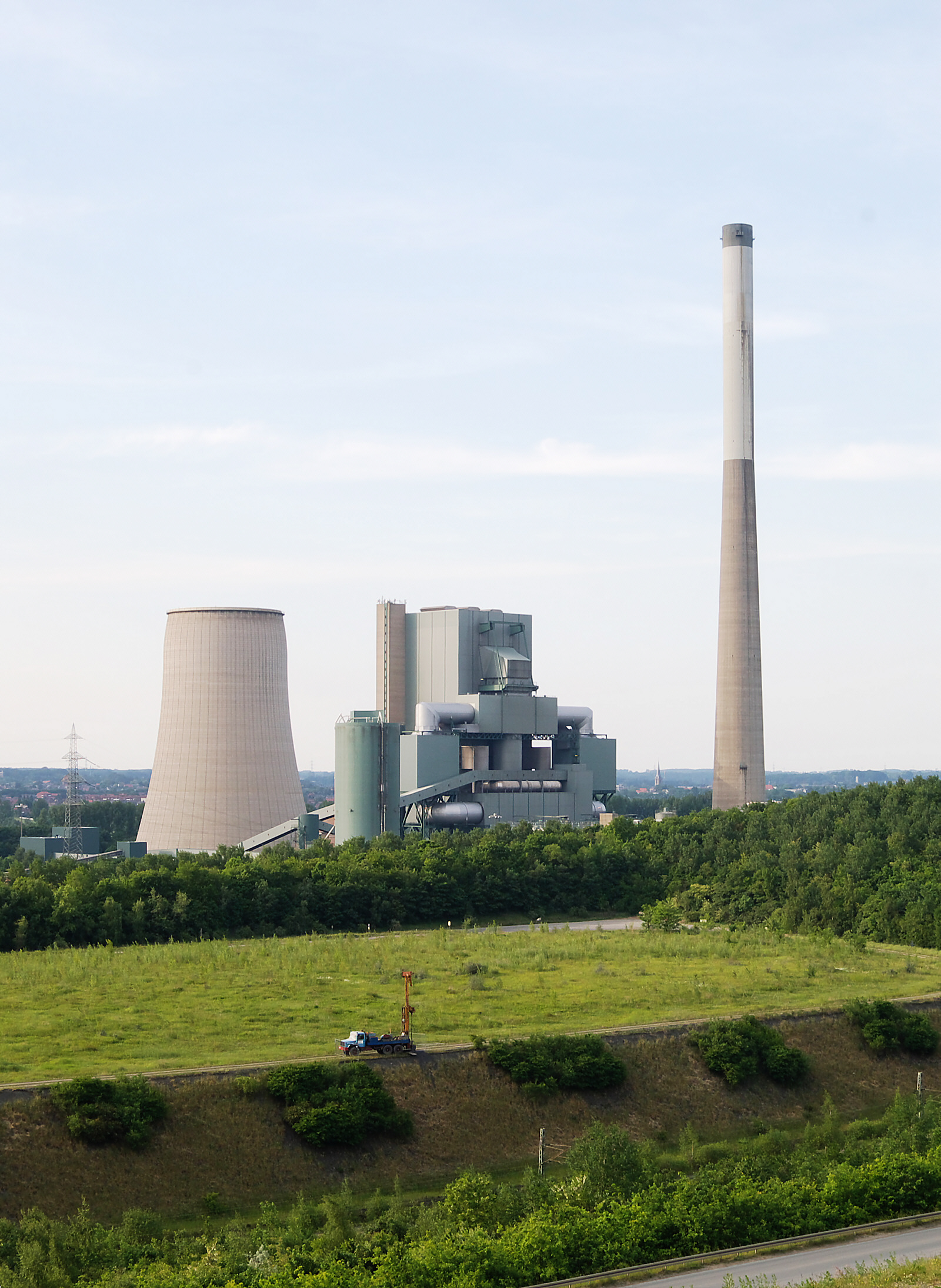 Kohlekraftwerk in Bergkamen-Heil, von der Halde "Großes Holz" aus gesehen